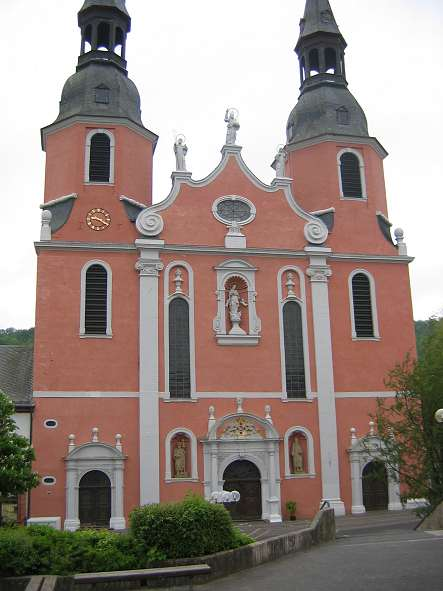 Abteikirche Prüm, seit 1802 Pfarreikirche, seit 1950 Basilika. Fotografiert von Benutzer:Mussklprozz am 21. Mai 2004.